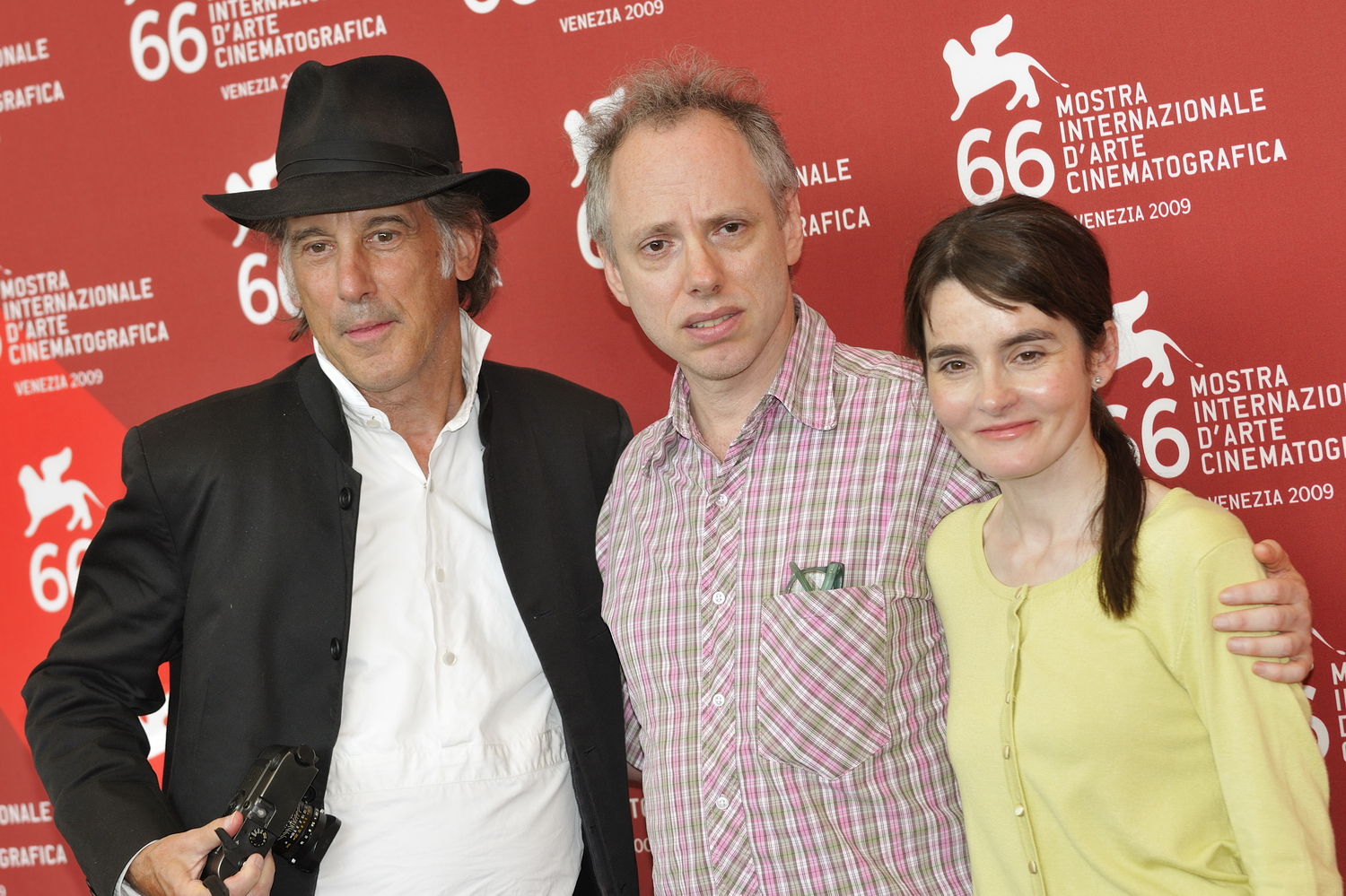 66ème Festival du Cinéma de Venise (Mostra), 2ème jour (03/09/2009) Ed Lachman (directeur de la photographie), Todd Solondz et Shirley Henderson lors du Photocall pour le film : Life during a wartime.